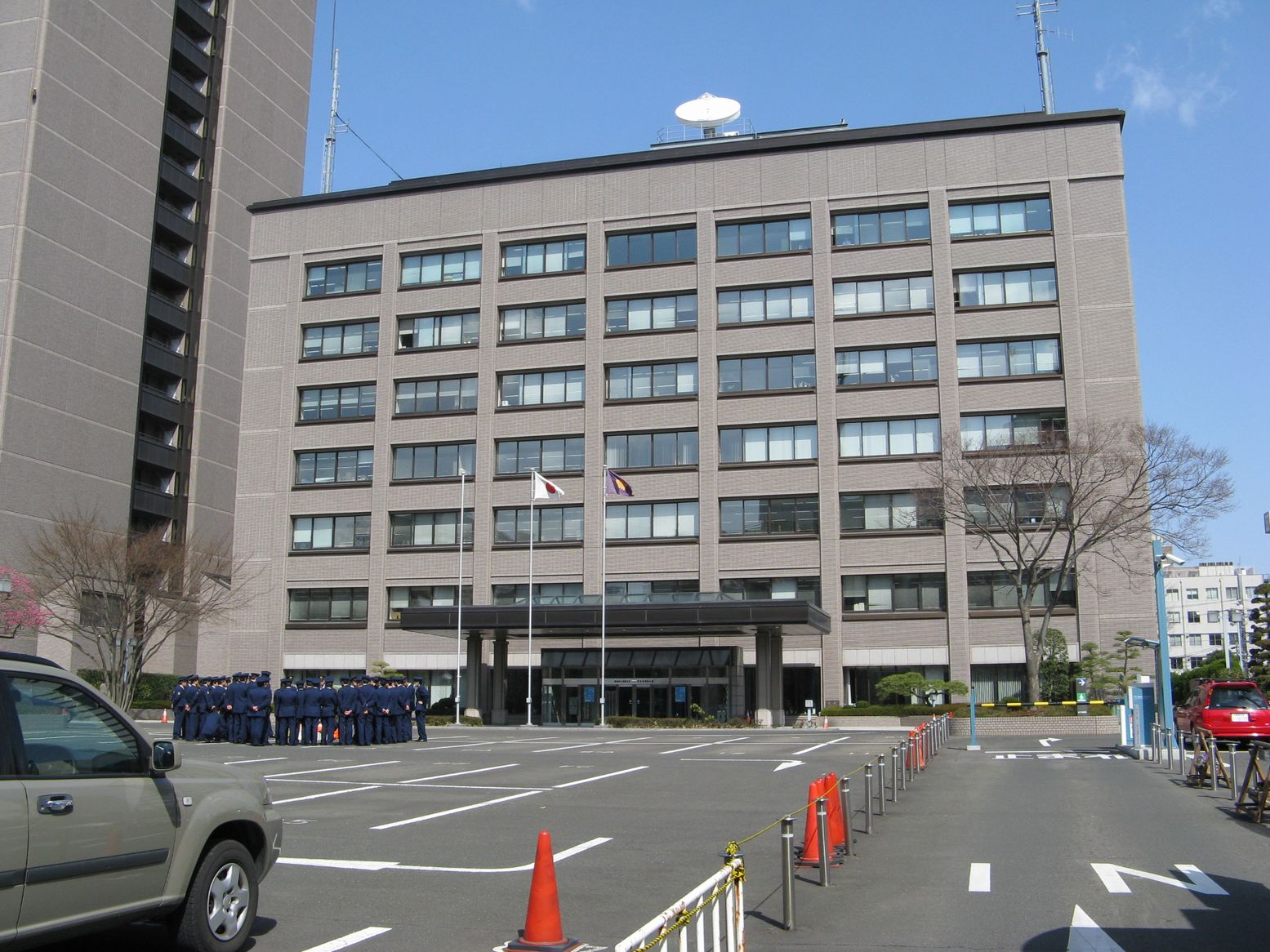 宮城県警察本部